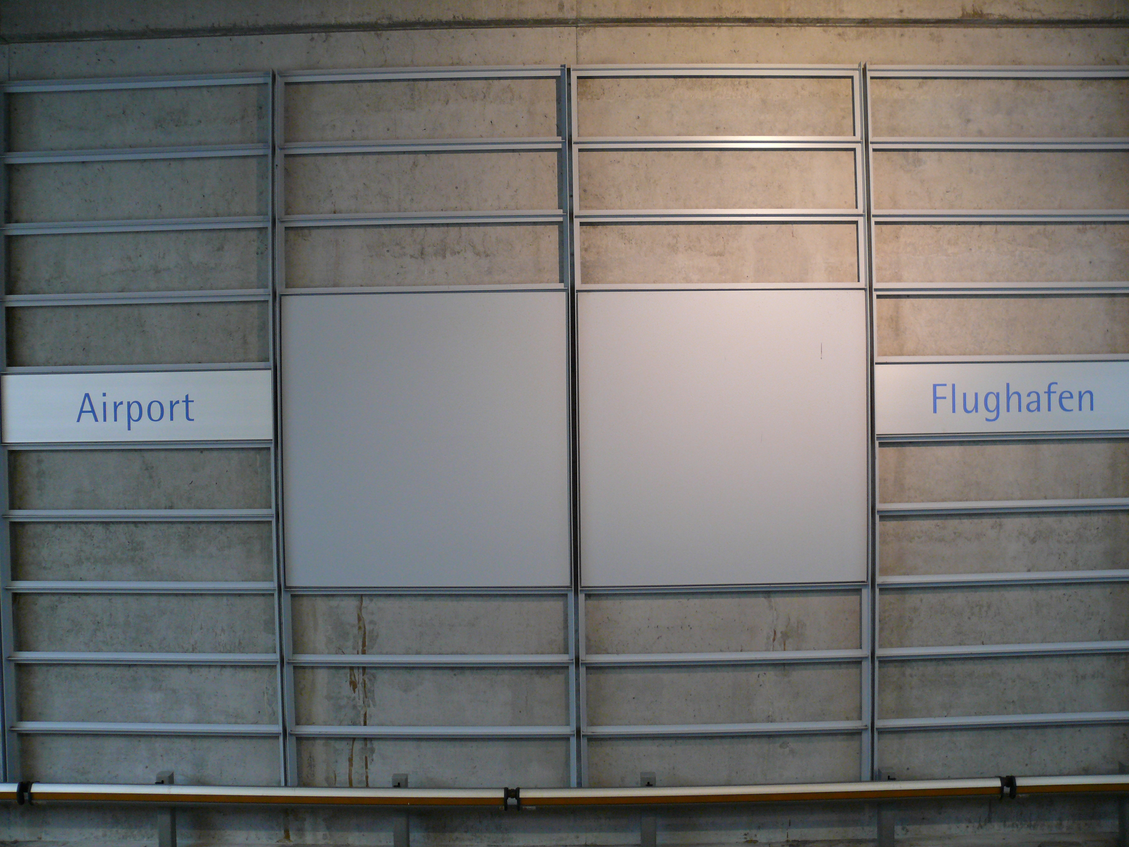 Stationsname (zweisprachig) auf der Bahnsteigebene am U-Bahnhof Flughafen in Nürnberg.